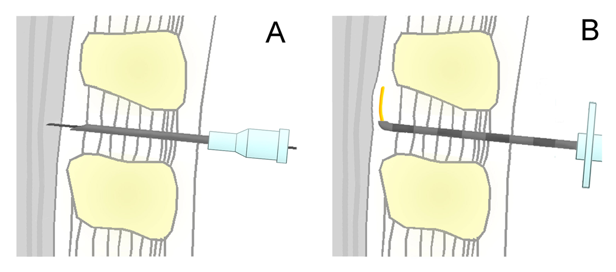 schematische Darstellung der Spinalanästhesie (A) und Periduralanästhesie (B) im Vergleich. Gezeigt ist ein medianer Schnitt in der Sagittalebene (Höhe mittlere Lendenwirbelsäule). Vereinfachte Darstellung, die Größenverhältnisse stimmen nicht mit der Realität überein. A. Prinzip der Durchführung einer Spinalanästhesie. Durch die zuvor zwischen den Dornfortsätzen der Wirbel L3/4 eingebrachte Führungskanüle wird die eigentliche Spinalnadel eingeführt und mit ihr der Subarachnoidalraum (Liquorraum) punktiert. Durch diese Nadel können dann Lokalanästhetika und andere Medikamente injiziert werden. B. Bei der Periduralanästhesie (PDA) wird eine Tuohy-Nadel vorgeschoben, bis der Periduralraum (Epiduralraum) erreicht wird, was sich durch einen Widerstandsverlust (Loss of Resistance) beim Einspritzen von Kochsalzlösung zeigt. durch die Kanüle wird dann der Periduralkatheter (gelb) in den Periduralraum eingeführt. Der Liquorraum ist bei einer PDA nicht betroffen. Inhaltliche Referenz: Jankovic, D: Regionalblockaden und Infiltrationstherapie. 3. Aufl. 2003. ABW Wissenschaftsverlagsgesellschaft. ISBN-13 9783936072167